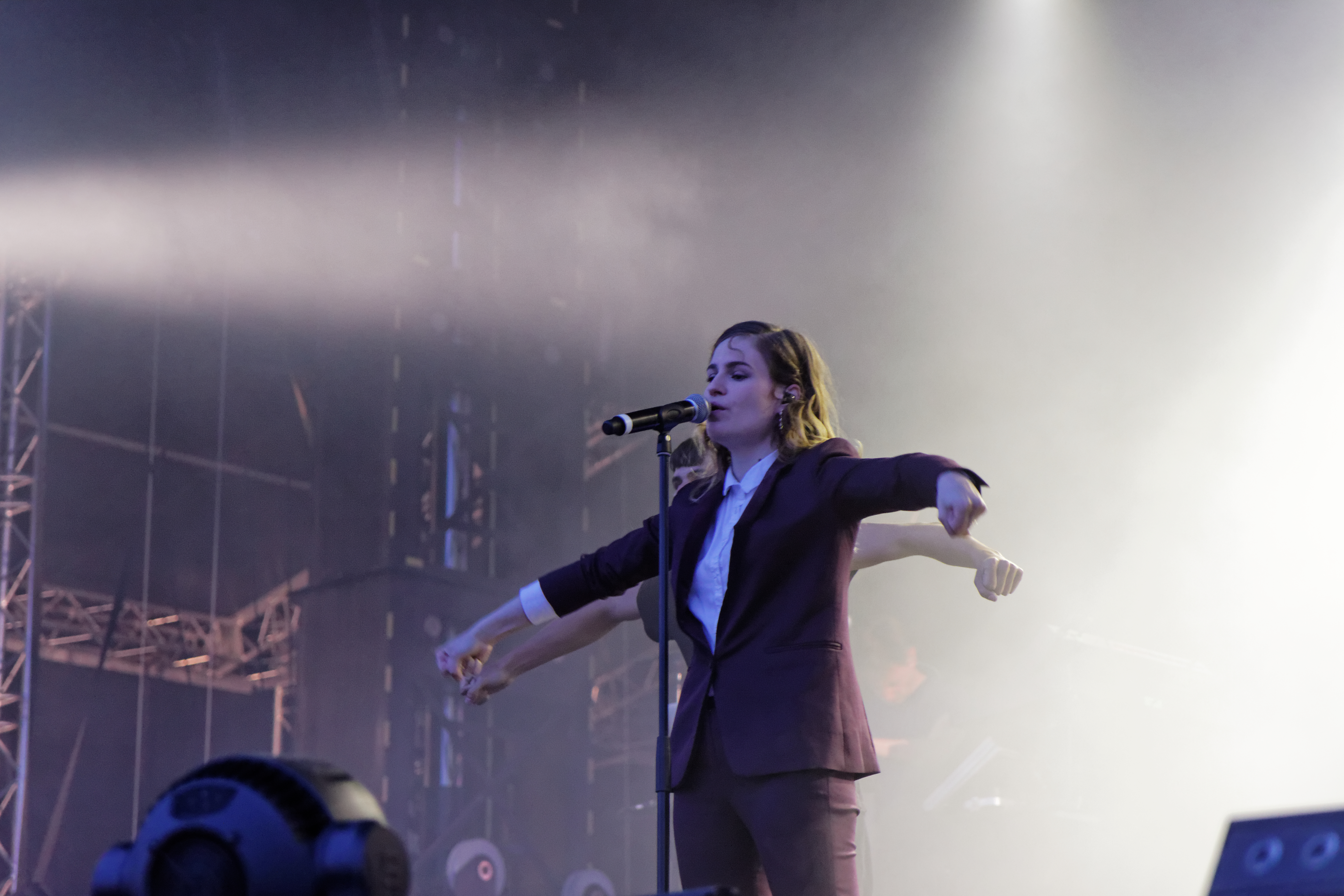 Christine and the Queens en concert sur la scène Grall lors du festival des Vieilles Charrues 2014.